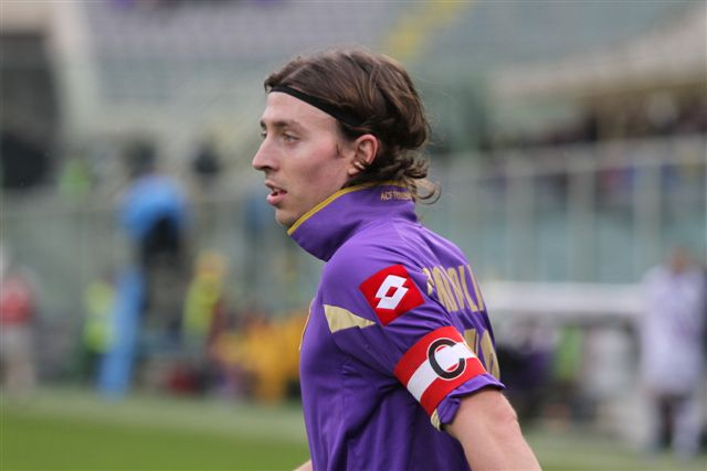 Riccardo Montolivo (Caravaggio, 18 gennaio 1985) è un calciatore italiano, centrocampista della Fiorentina (della quale è il capitano) e della Nazionale italiana.